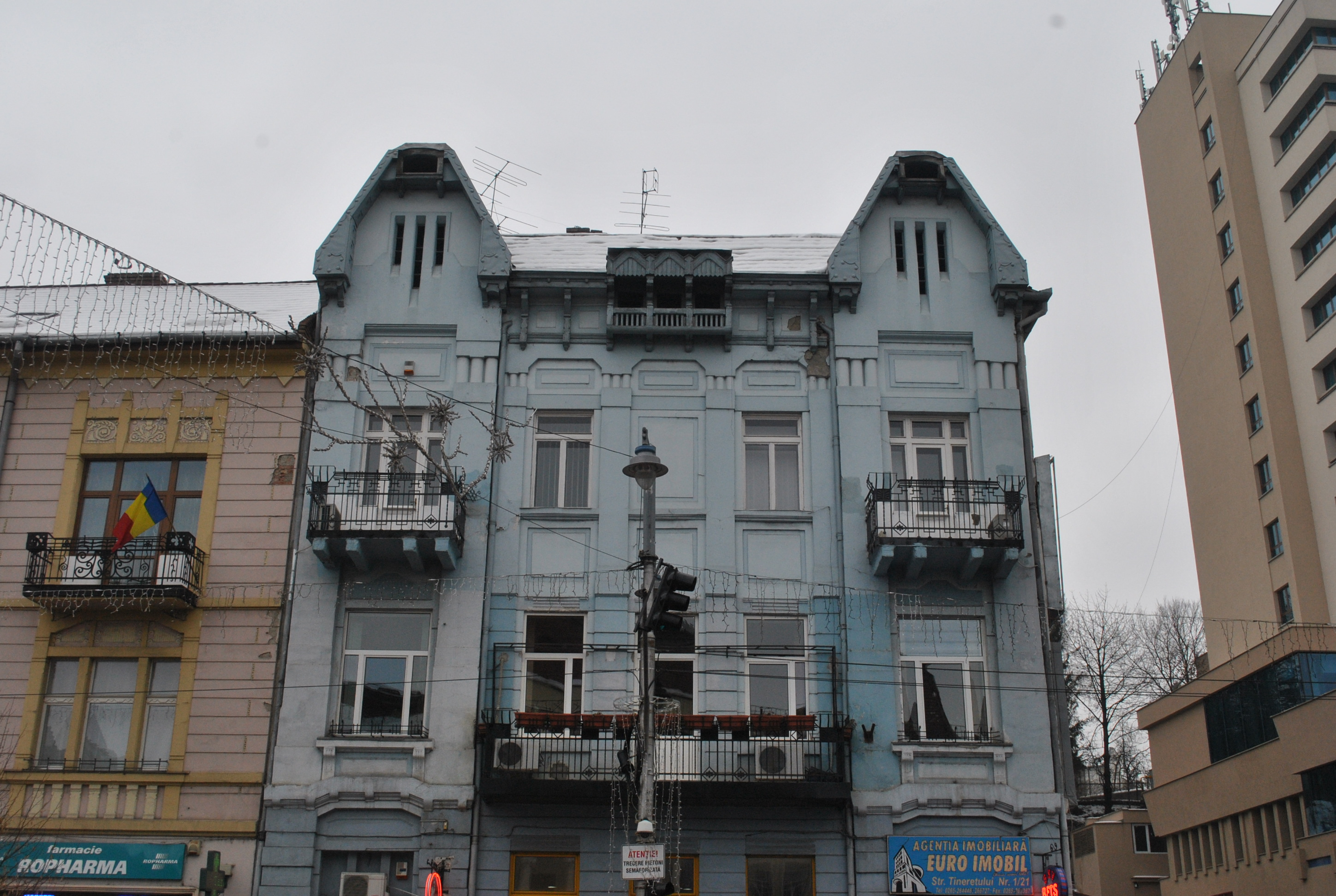 Casa "Dr. Fekete"